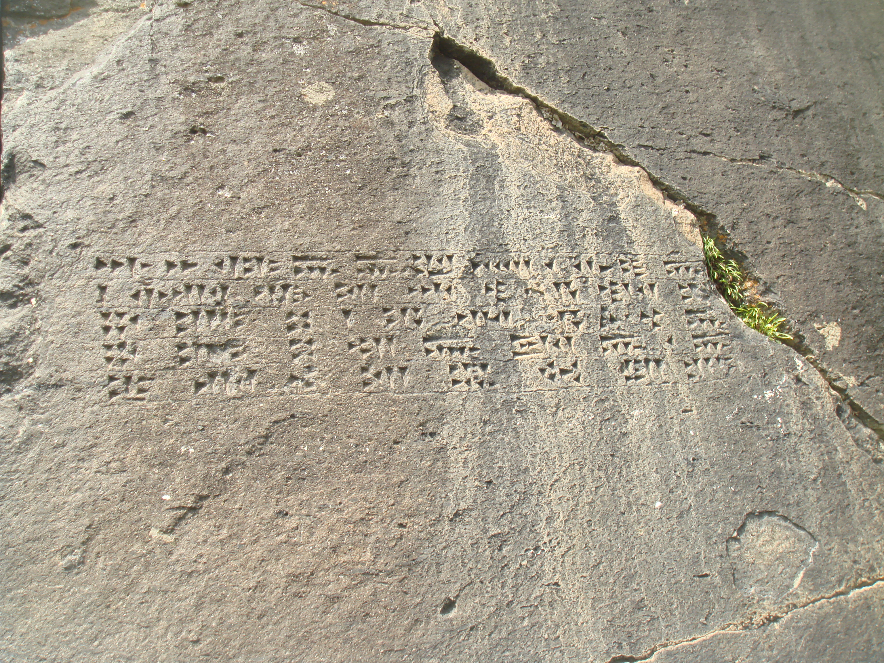 Մարմաշենի սեպագիր արձանագրությունը 78/2